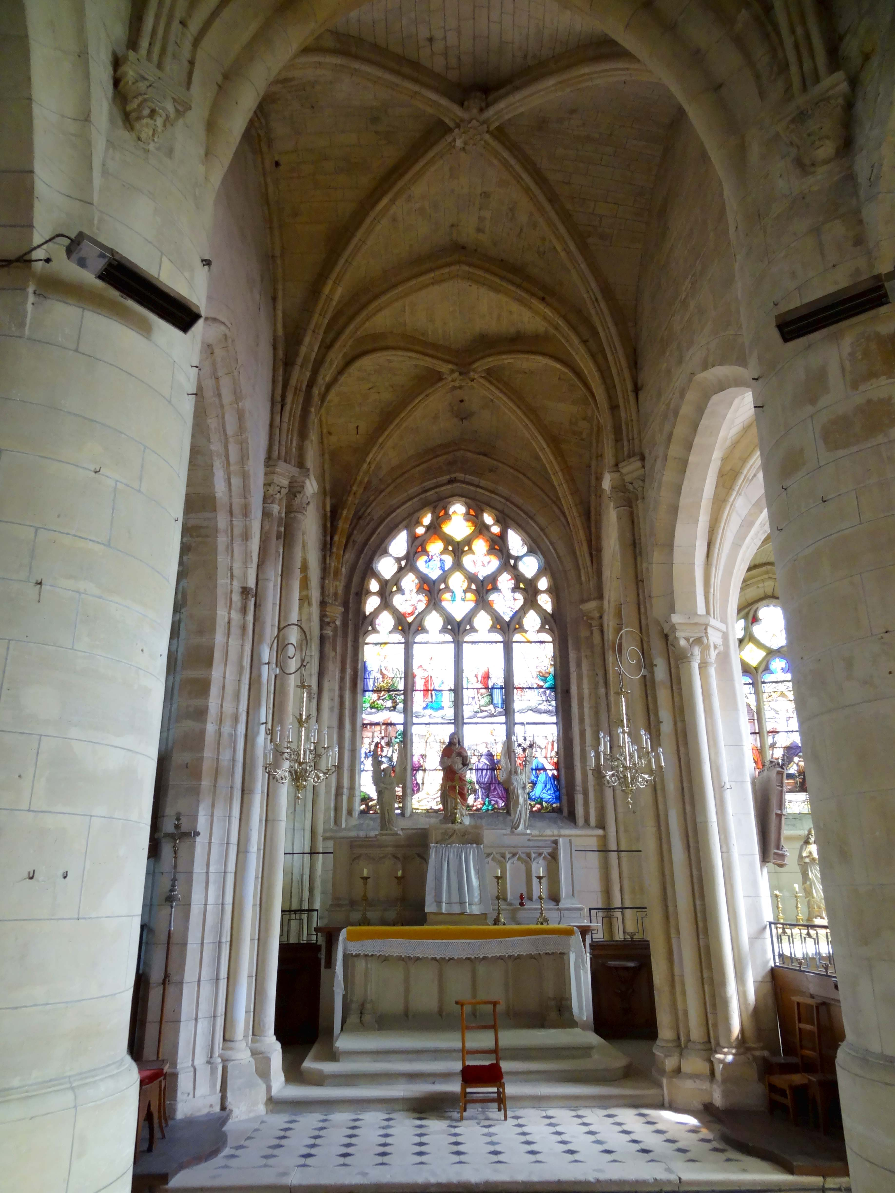 Intérieur de l'église - voir titre.